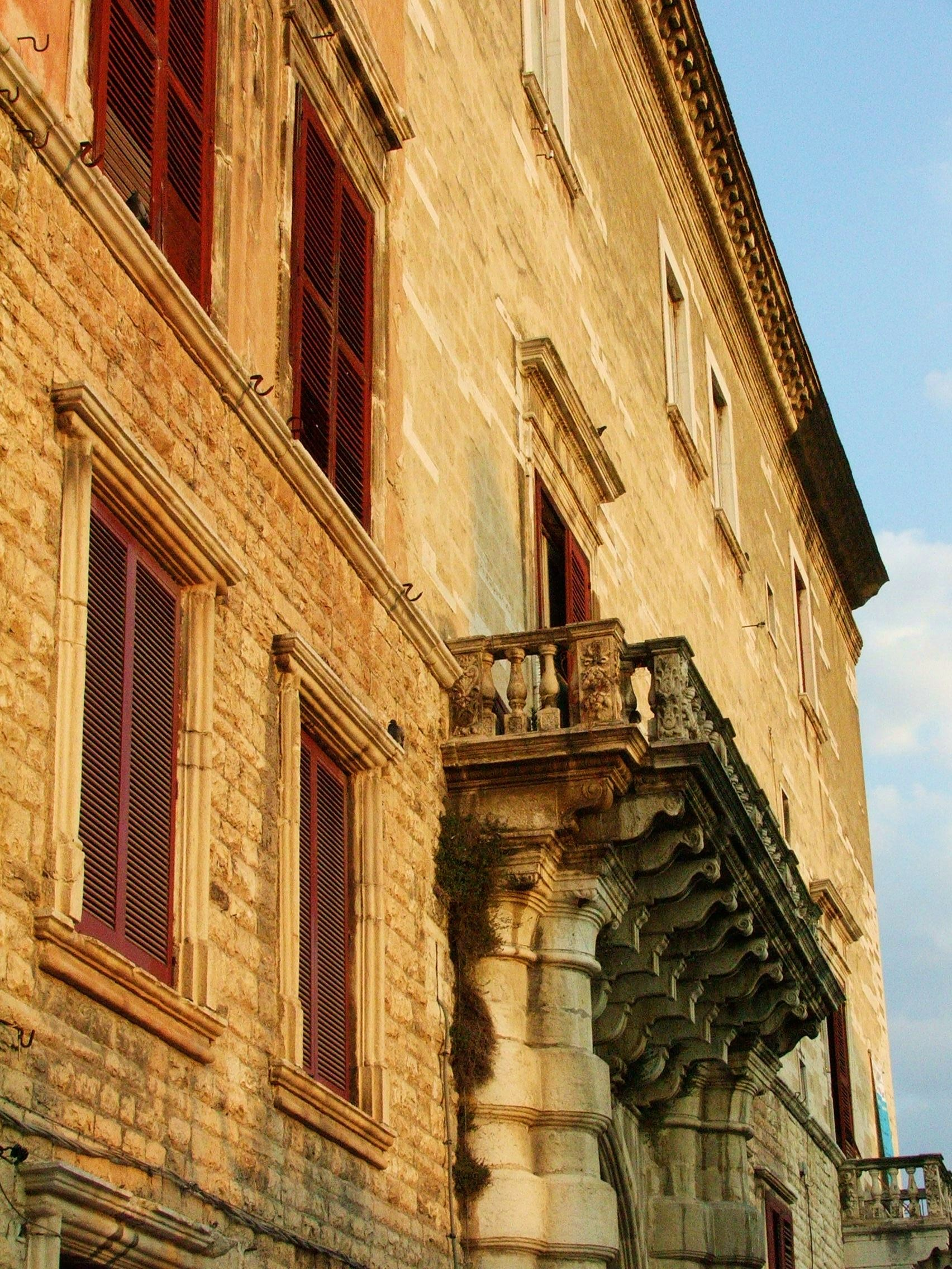 Palazzo ducale di Andria, costruito sul vecchio castello normanno. Passato in proprietà nelle mani dei vari duchi della città, i Del Balzo, i Carafa ed i Spagnoletti.